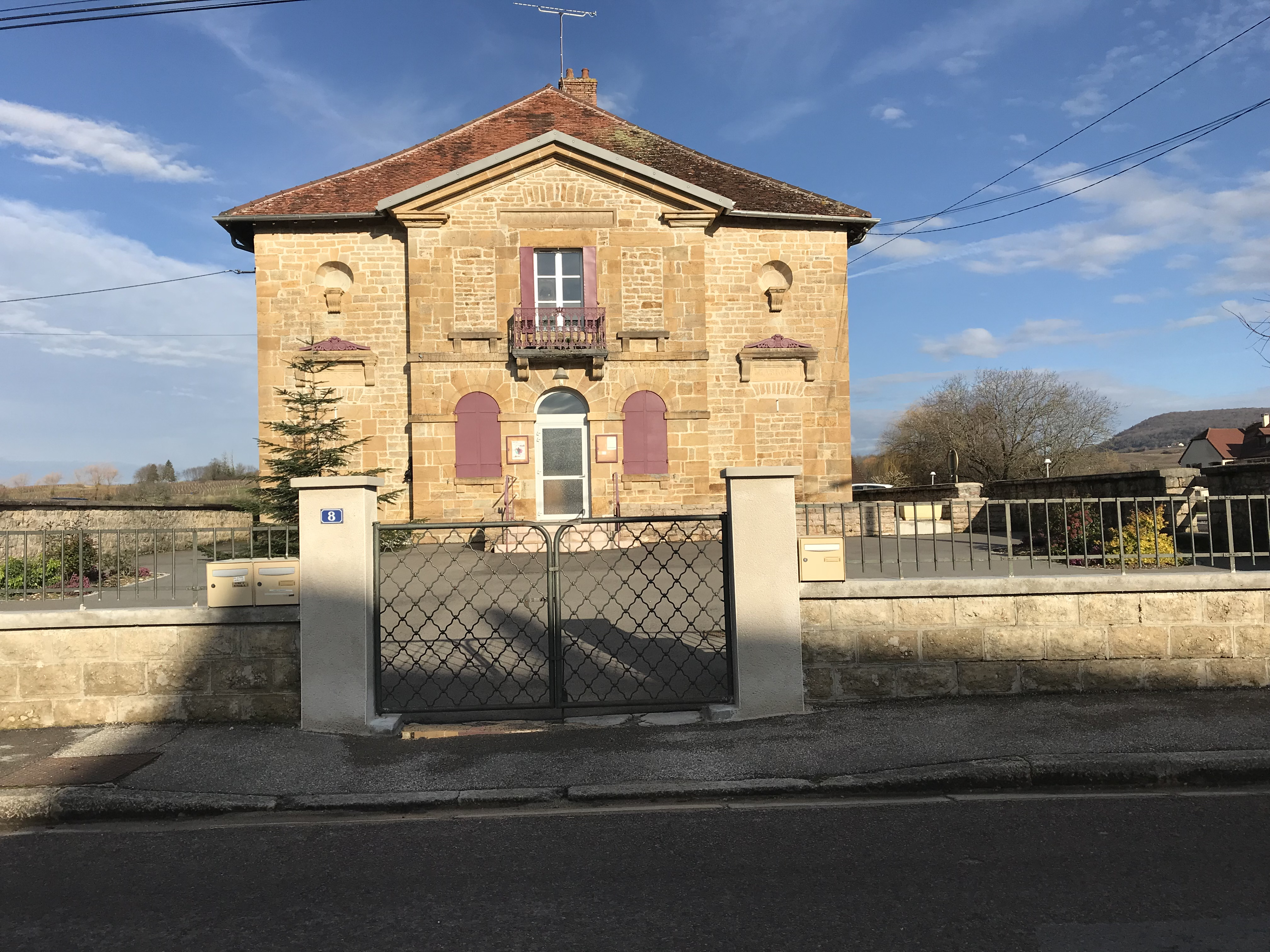 Villette-lès-Arbois (Jura, France) en janvier 2018.